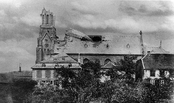 Folgen des Orkans in Lebach